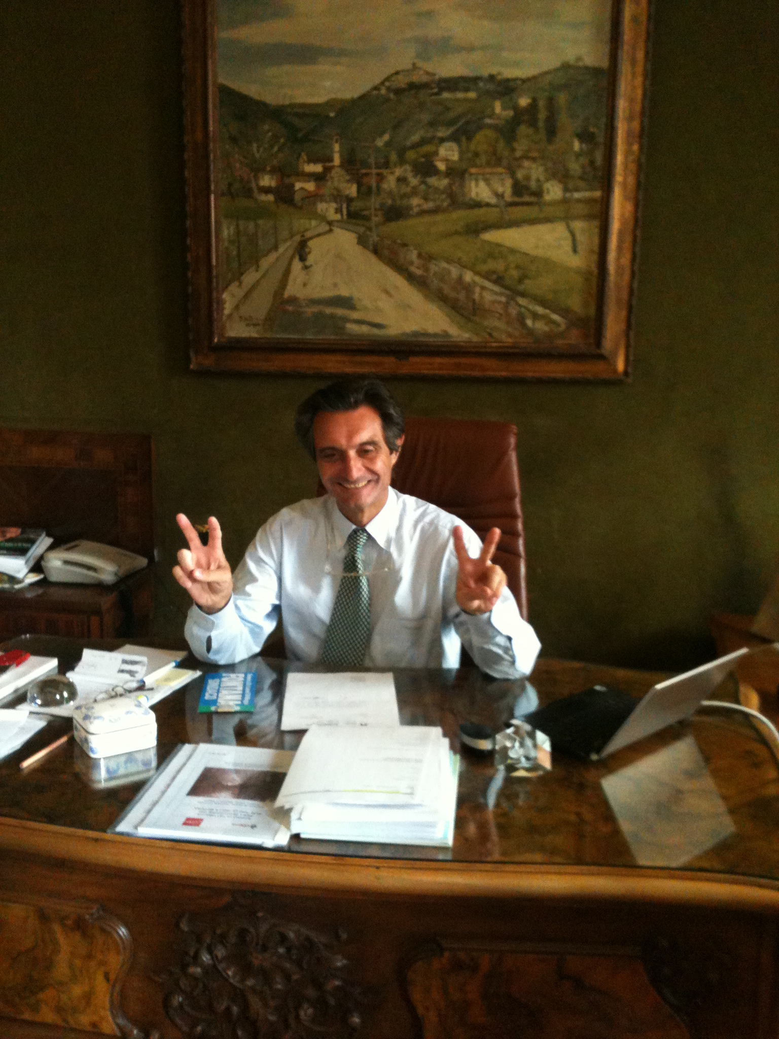 Attilio Fontana Politico